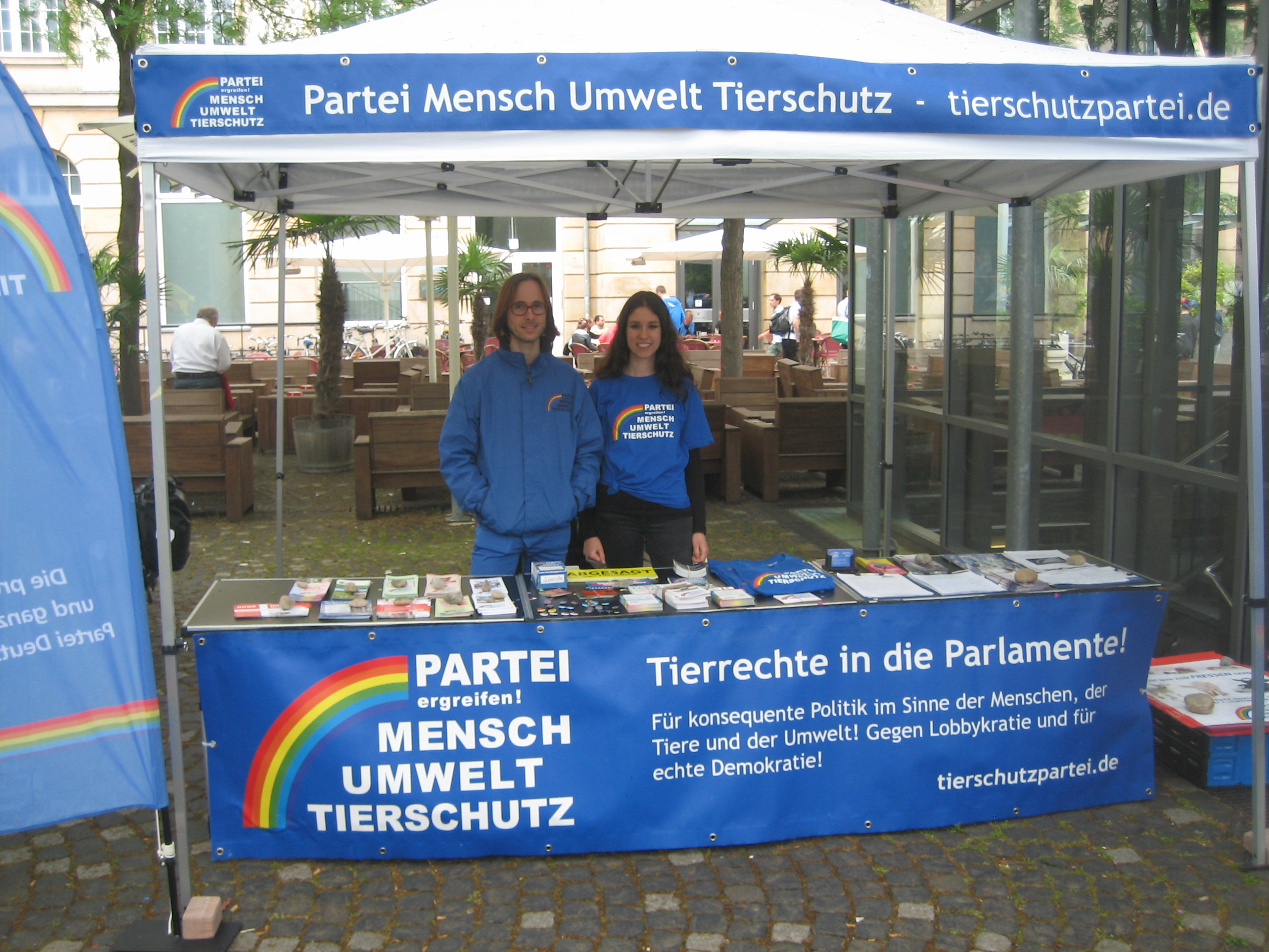 Tierschutzpartei beim CSD in Karlsruhe im Mai 2015